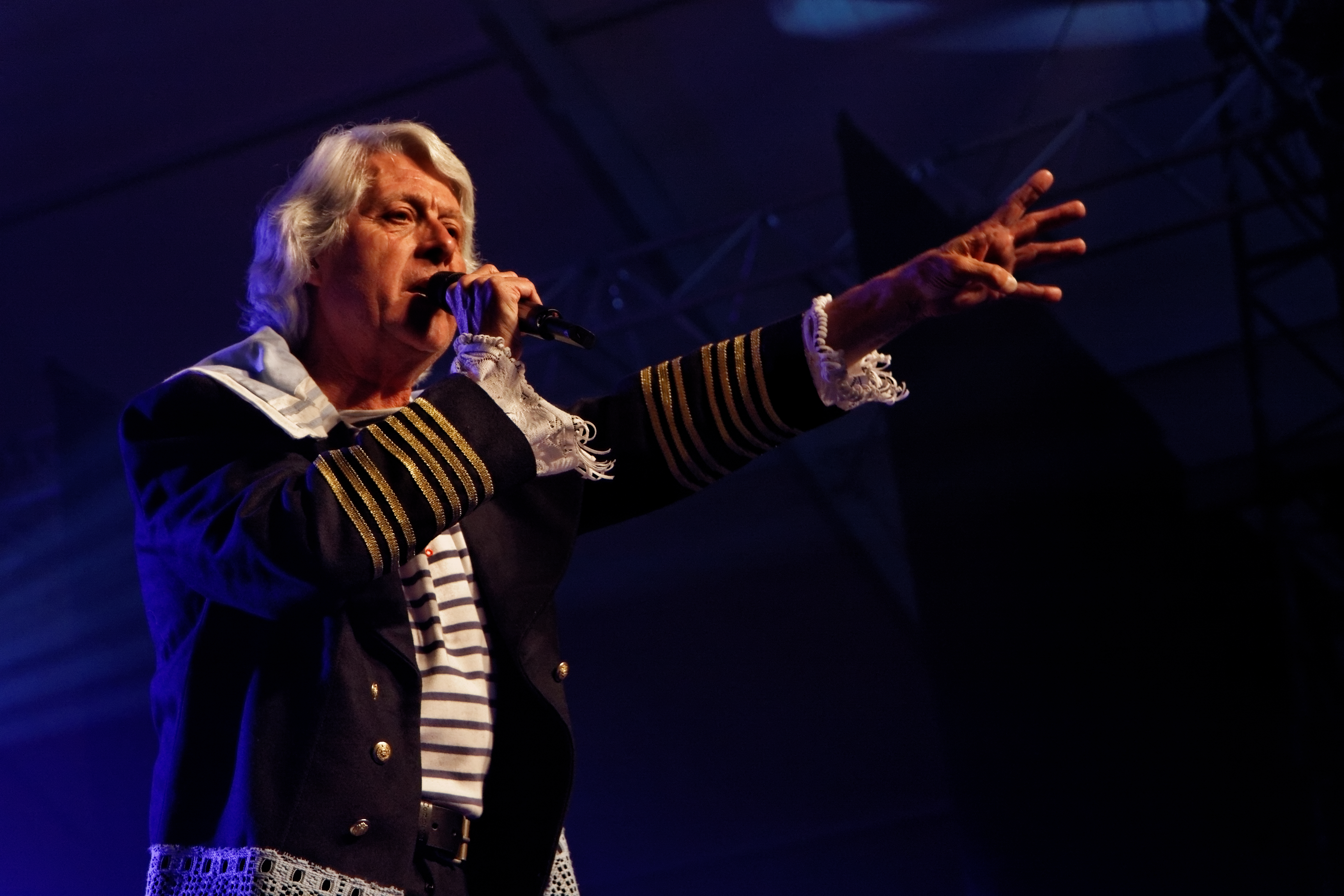 Tri Yann en concert à l'espace Gradlon lors du festival de Cornouaille 2012.